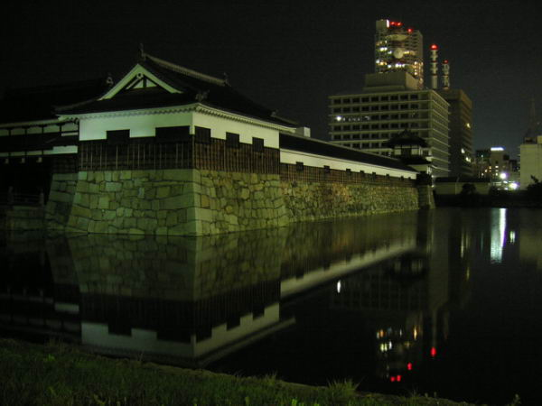 Burgmauer von Hiroshima nachts